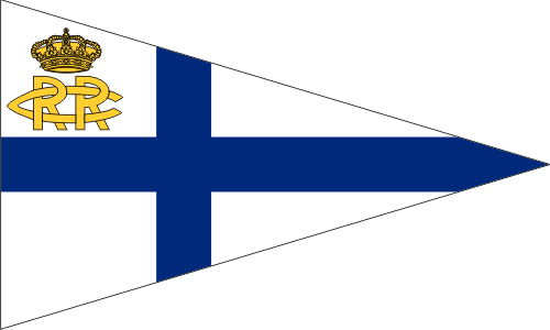 Bandera del Real Club de Regatas de Alicante (España)